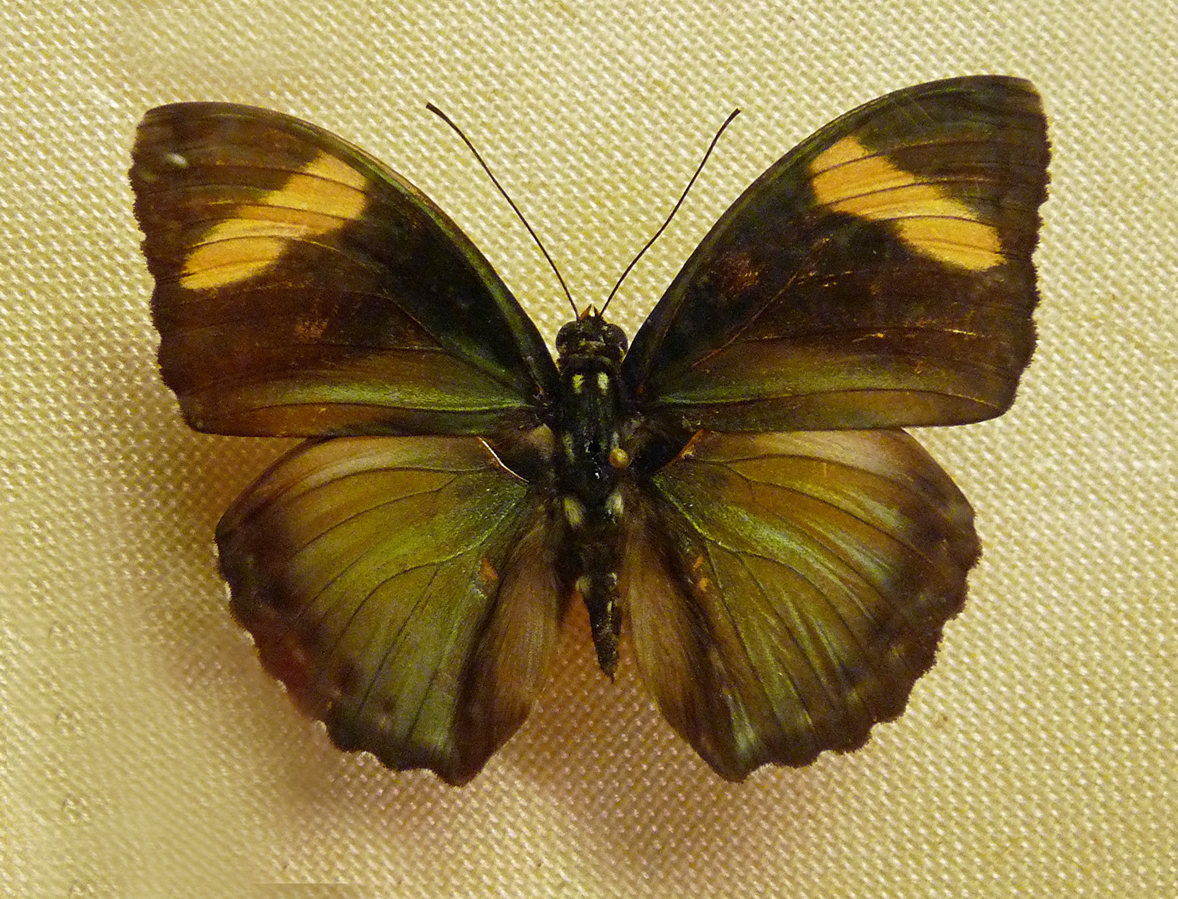 Euphaedra (Euphaedrana) justitia (Staudinger, 1886) (Cameroun) - Musée zoologique de Strasbourg